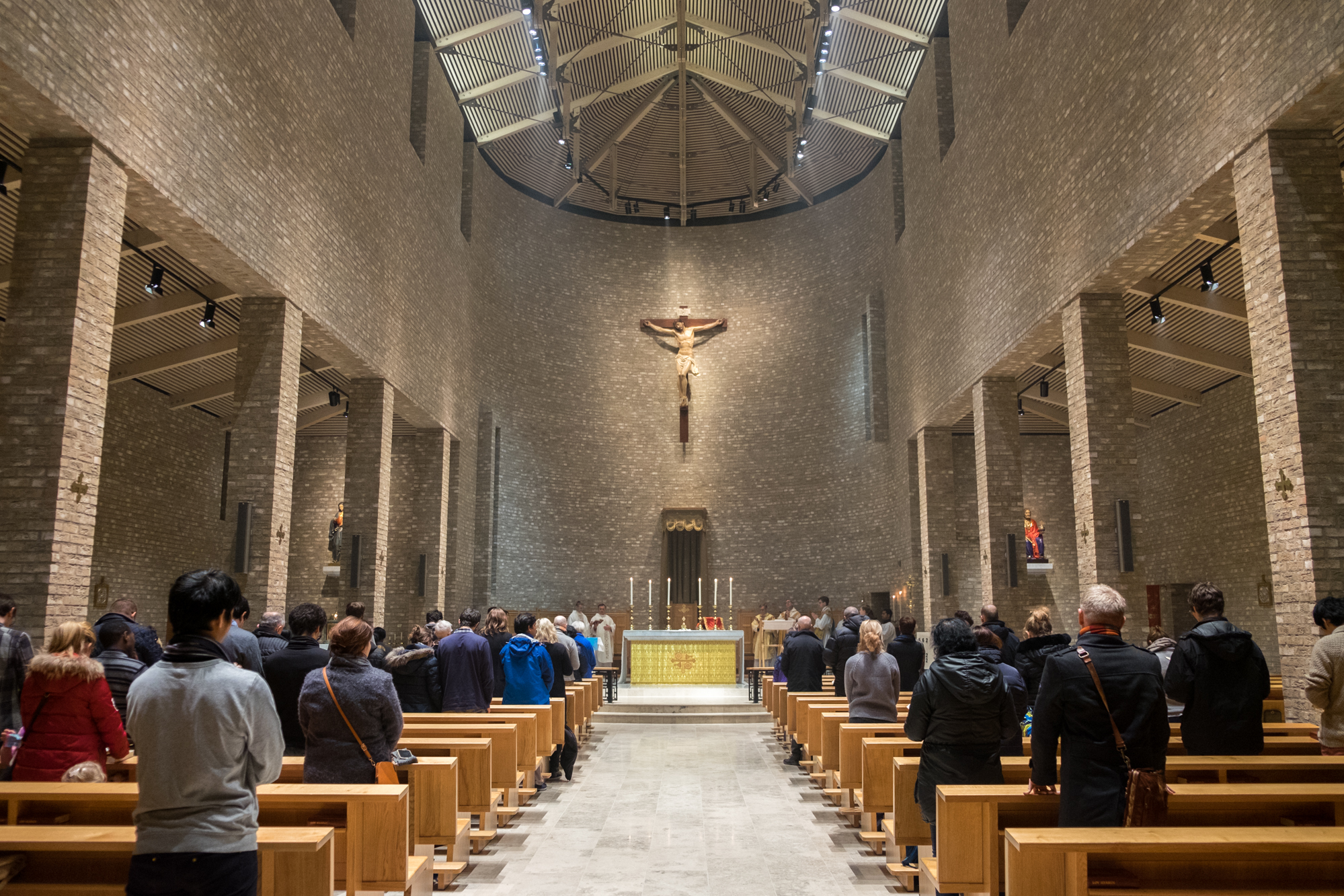 Hovedskipet sett mot alteret.